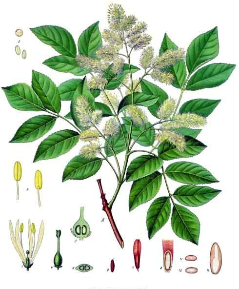 Manna-Esche. A Blühender Zweig, nat. Grösse; 1 Blüthe, vergrössert; 2 Staubgefässe, desgl.; 3 Pollen, desgl.; 4 Stempel, desgl.; 5 Fruchtknoten im Längsschnitt, desgl.; 6 derselbe in Querschnitt, desgl.; 7 Frucht, nat. Grösse; 8 dieselbe im Längsschnitt, vergrösserrt; 9 Same nat. Grösse; 10 derselbe im Längsschnitt, vergrössert; 11 und 12 derselbe im oberen und unteren Theile querdurchschnitten.